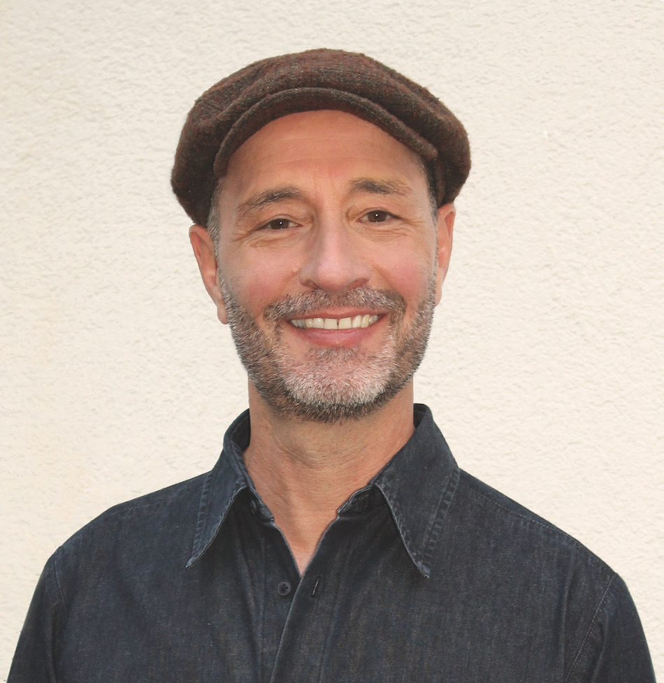 Autorenfoto Daniele Meocci